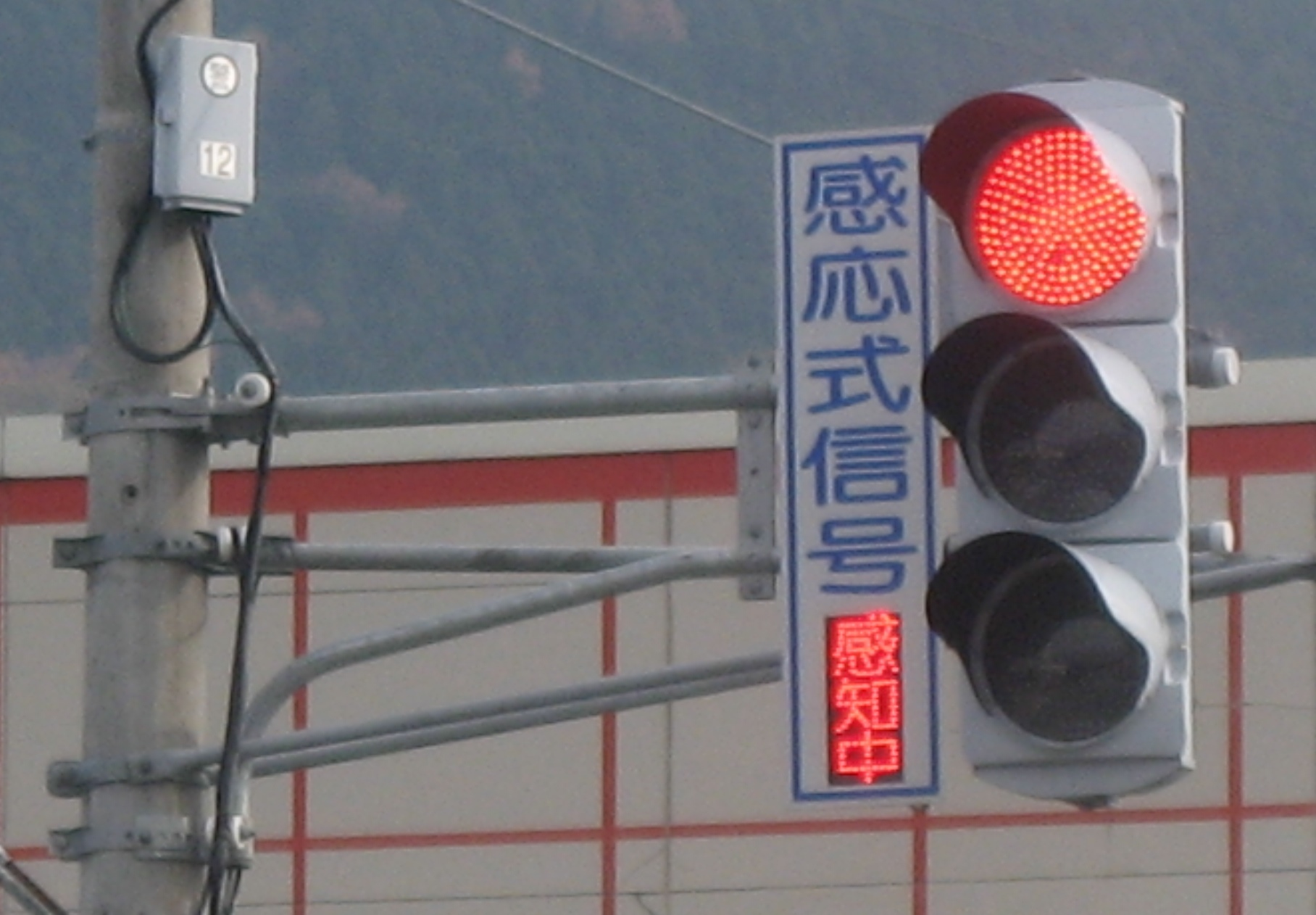 山形県白鷹町内に設置されている感応式信号表示板（「感知中」表示）